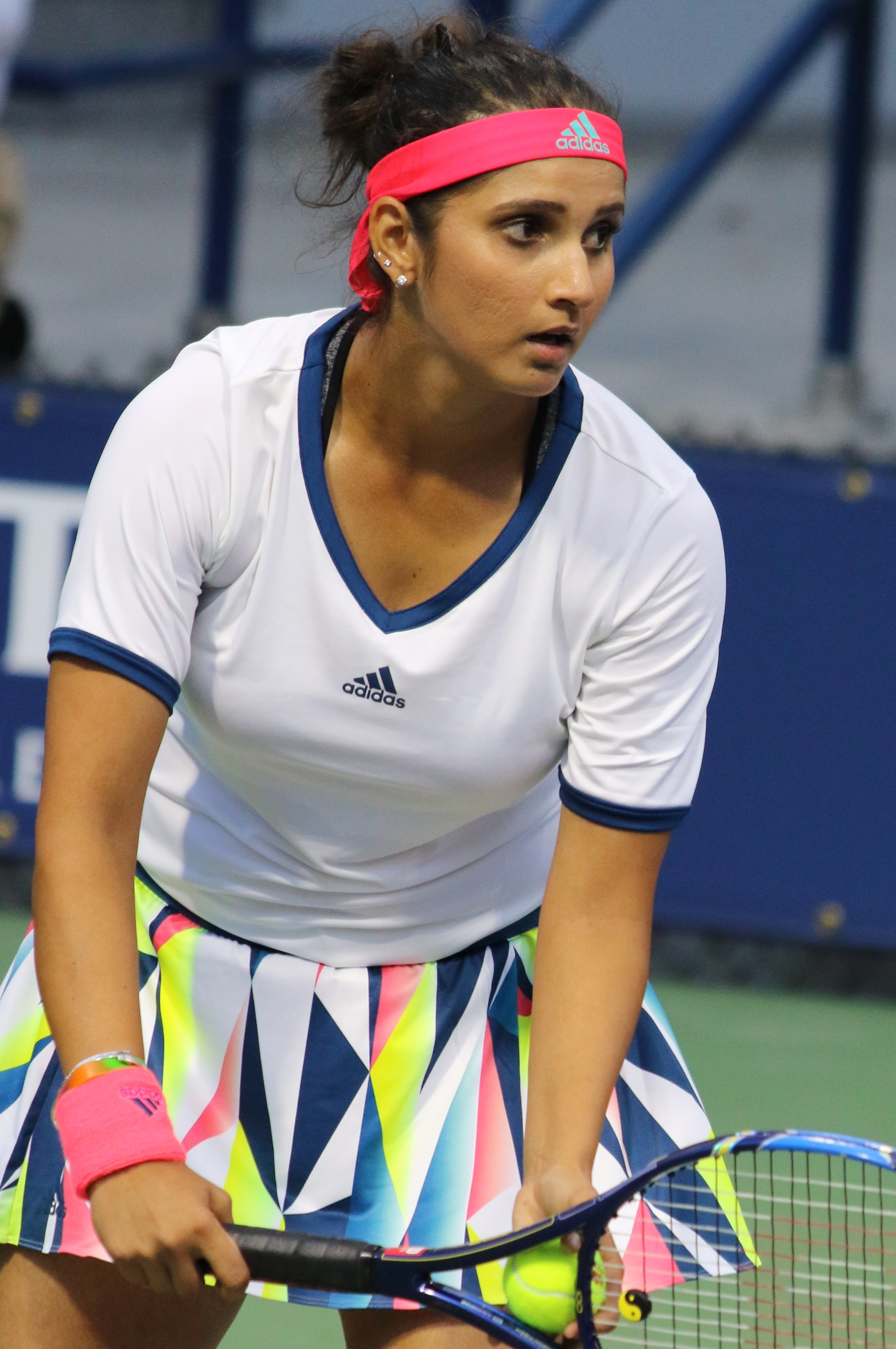 Mirza US16 (3)